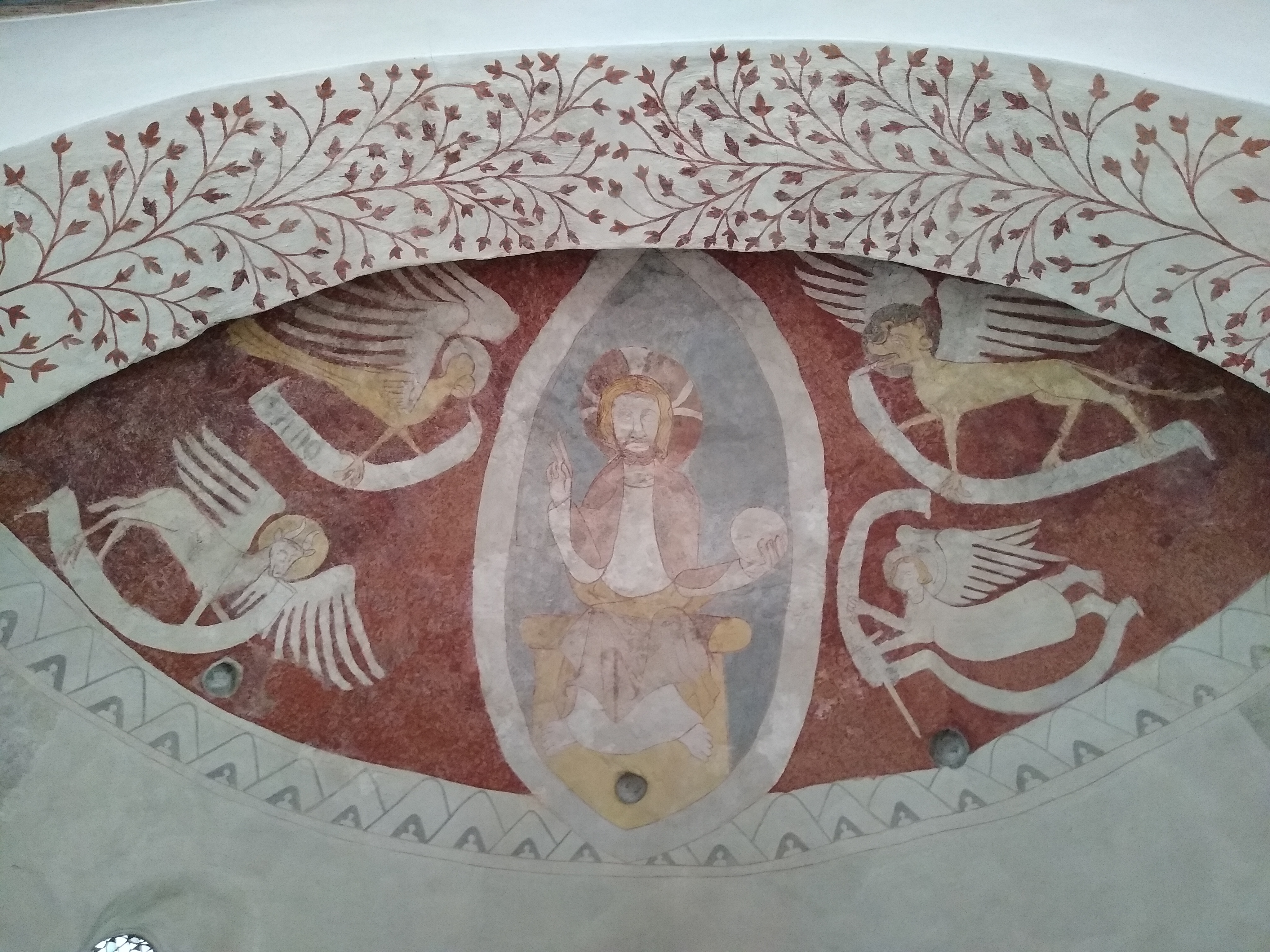 Aspisfresko in der Johanneskirche Seeburg aus der Zeit um 1280 (Christus in der Mandola, umgeben von Evangelistensymbolen)